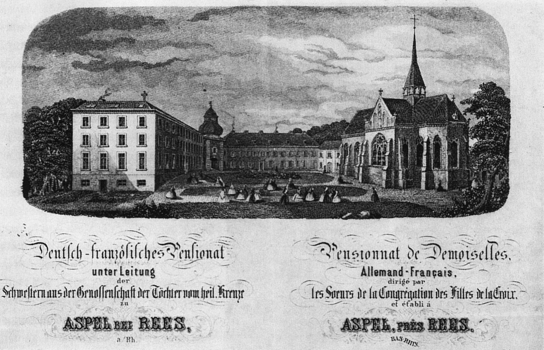 Werbung für das auf Haus Aspel beheimatete Mädchenpensionat